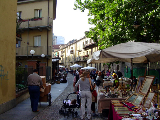 Mercato delle pulci del Balon, a Porta Palazzo, Torino (Italia)